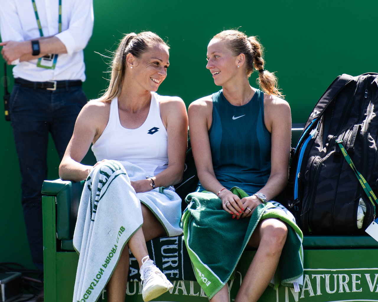 Petra Kvitova & Magda Rybarikova